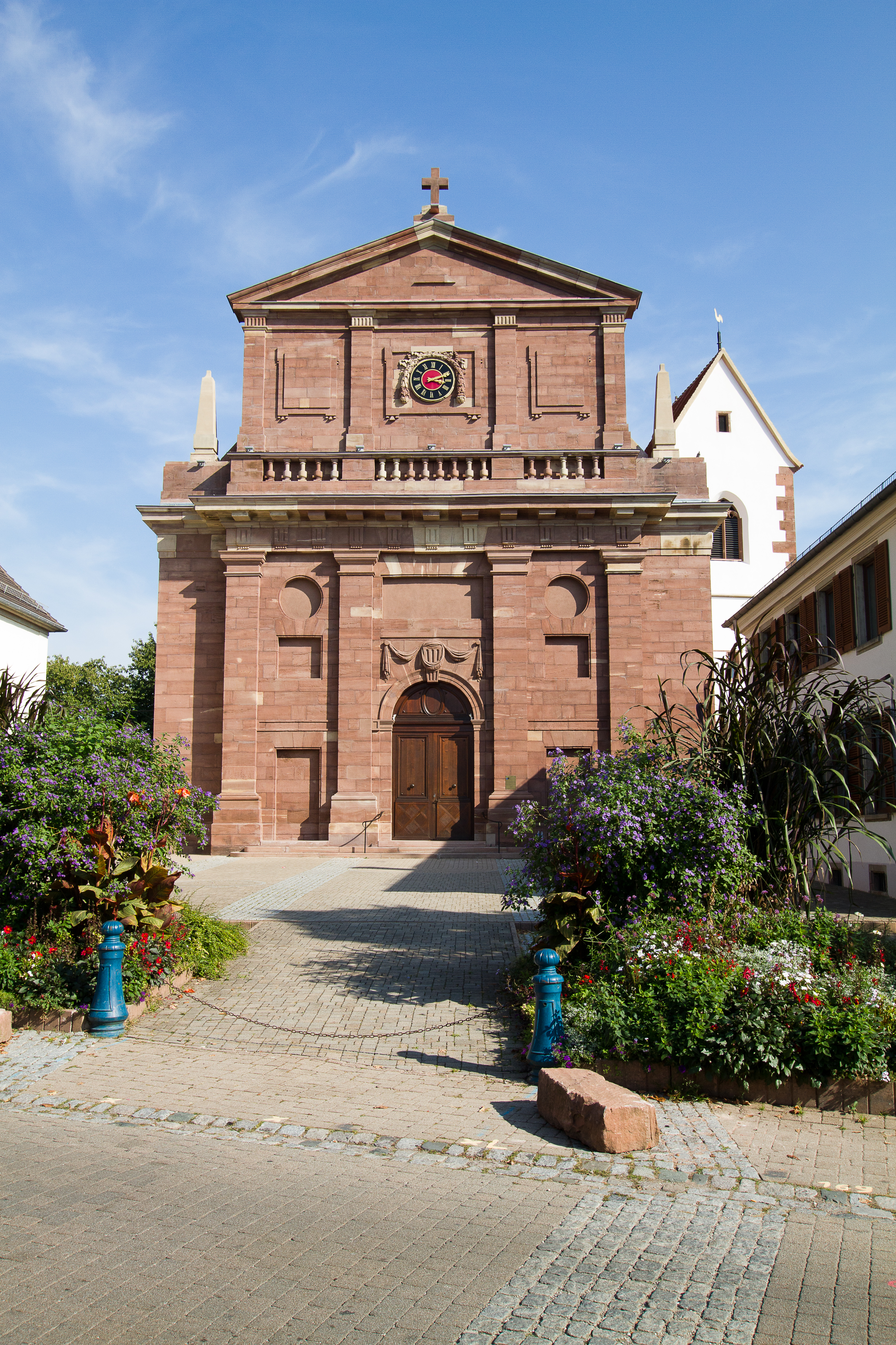 Église protestante Notre-Seigneur Jésus-Christ à Bischheim. Alsace, France